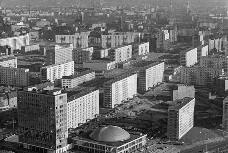 Zentralbild Spremberg 28.11.1966 Berlin: Blick vom Fernsehturm auf die Karl-Marx-Allee Das neue Berlin um die Karl-Marx-Allee aus der Vogelperspektive vom neuen Fernsehturm am Alexanderplatz gesehen. Der Turm hatte am 28.11.1966 eine Höhe von 165,70 Meter erreicht.